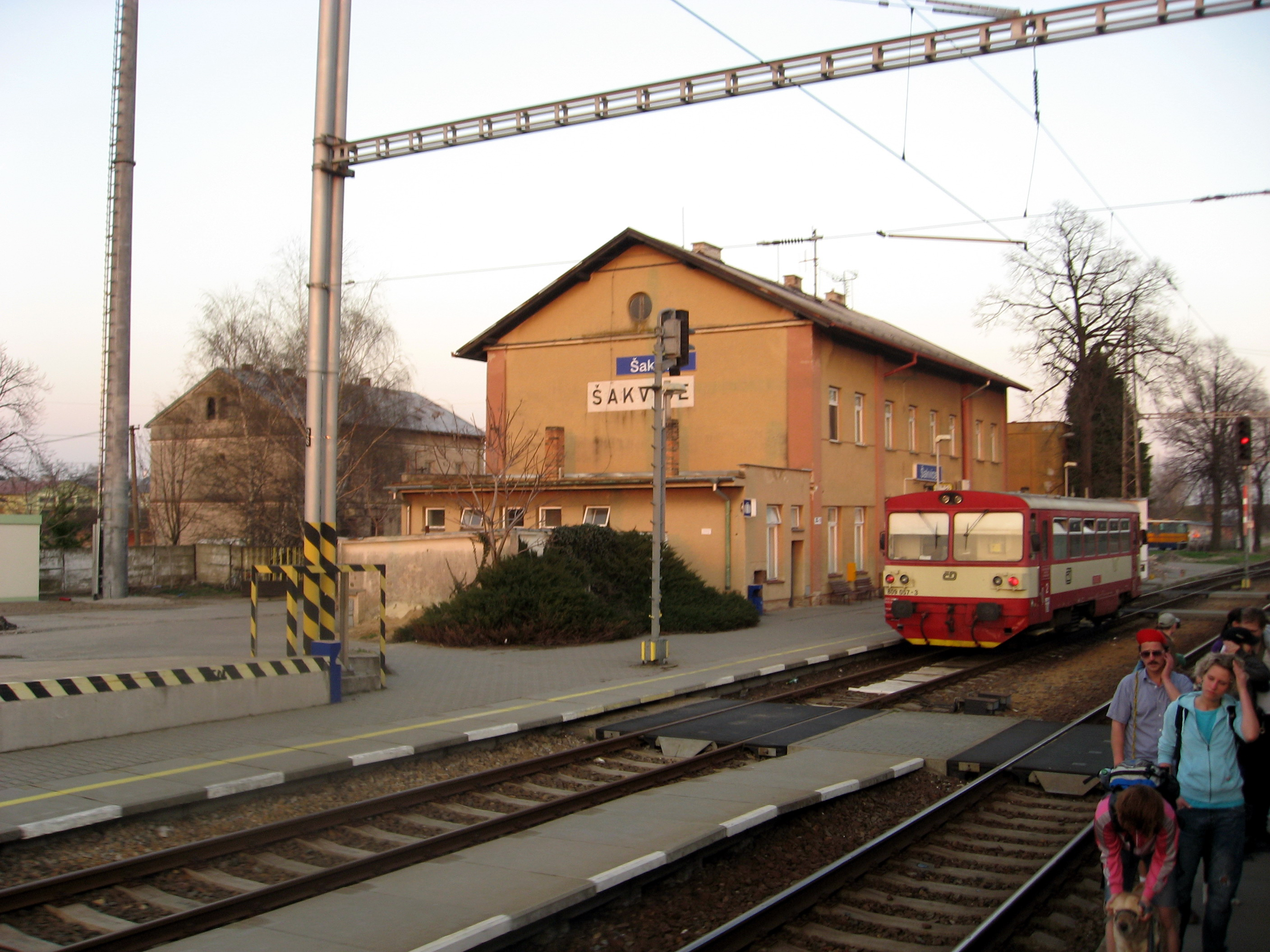 Šakvice, železniční stanice